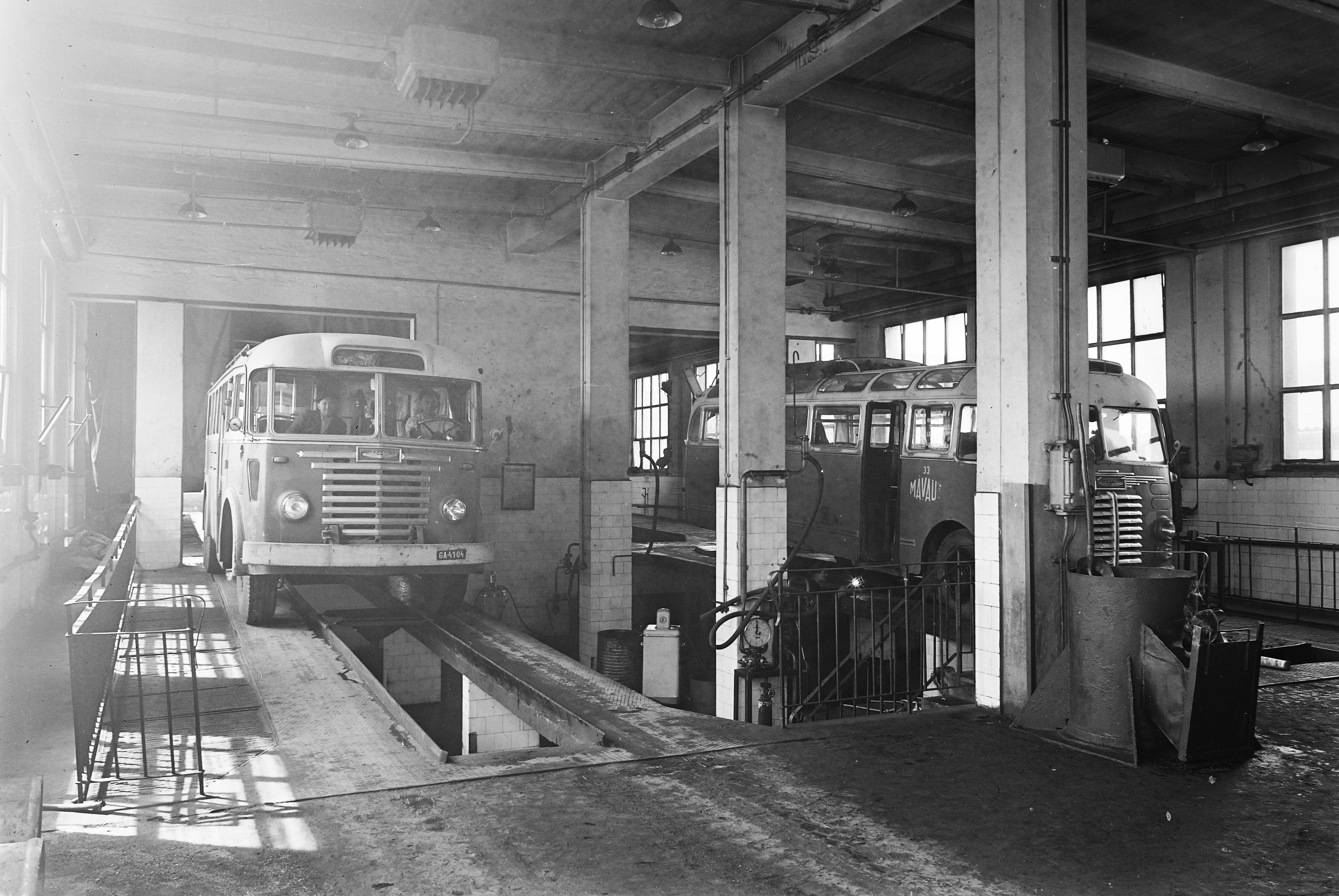 a 33.sz AKÖV autóbusz forgalmi telepe. Location: Hungary Tags: transport, vehicle, szervíz, bus, Hungarian brand, Ikarus-brand, number plate, MÁVAUT-organisation Title: a 33.sz AKÖV autóbusz forgalmi telepe.